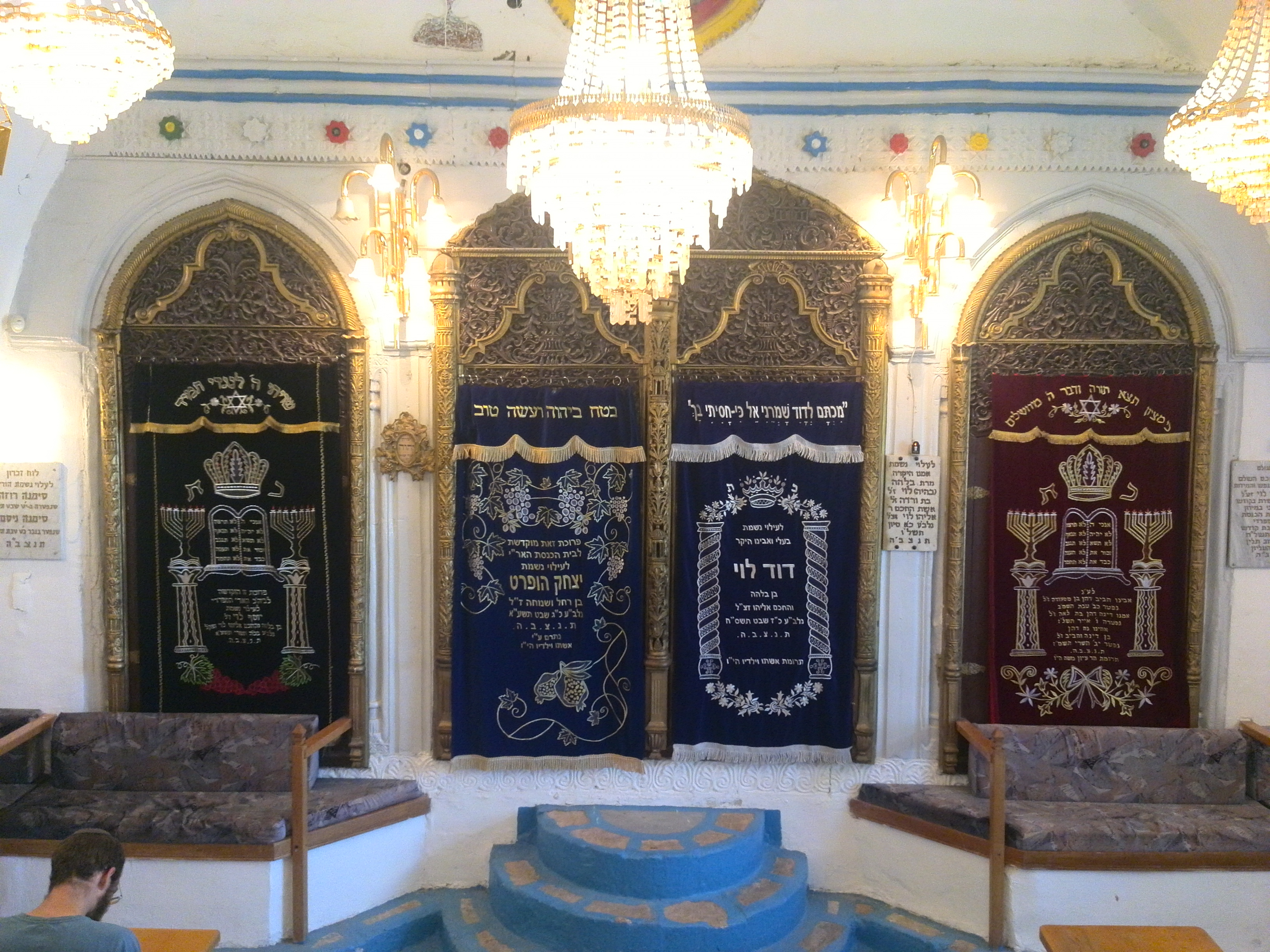 ארון הקודש בבית הכנסת הארי